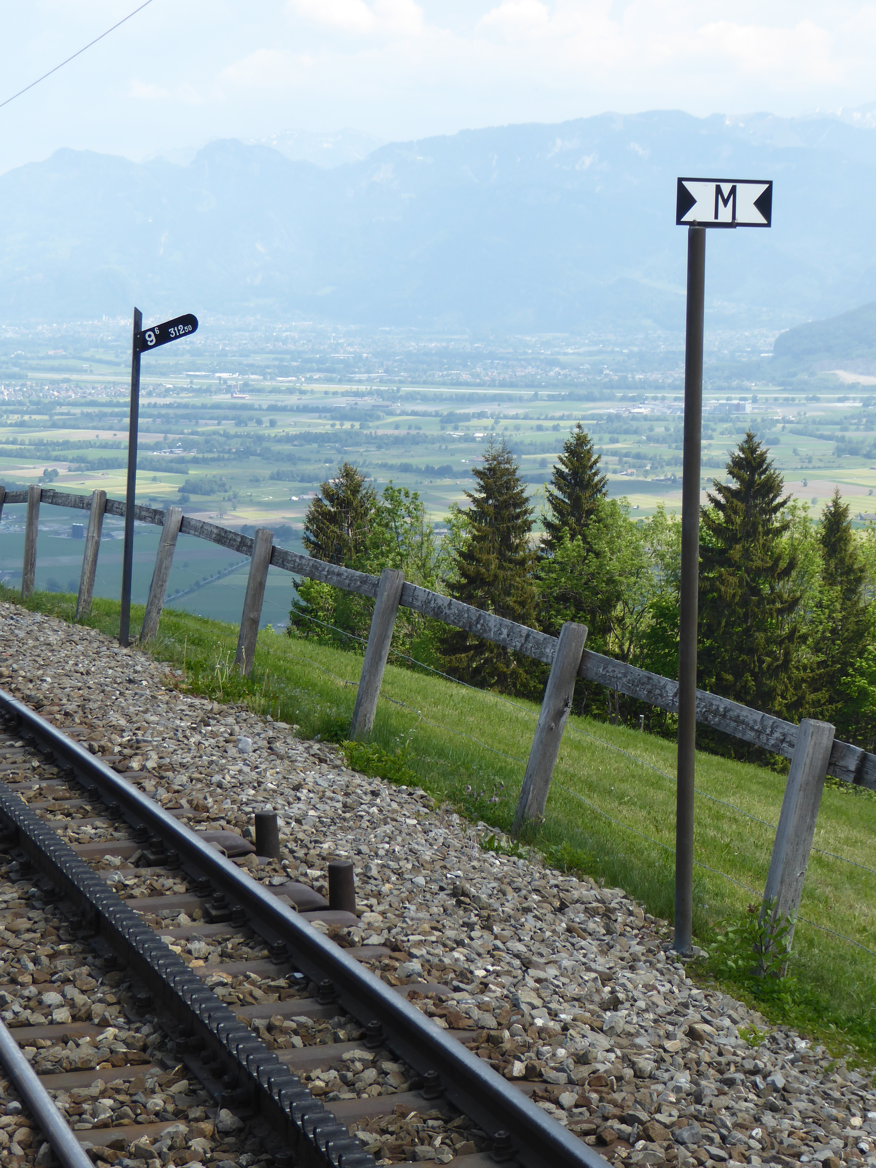 Gleismagnete zur Betriebsartenüberwachung Zahnrad-/Adhäsionsbetrieb mit dem zugehörigen Signalschild bei der Haltestelle Stoss der Appenzeller Bahnen. Im Hintergrund Rheintal und Vorarlberger Alpen.